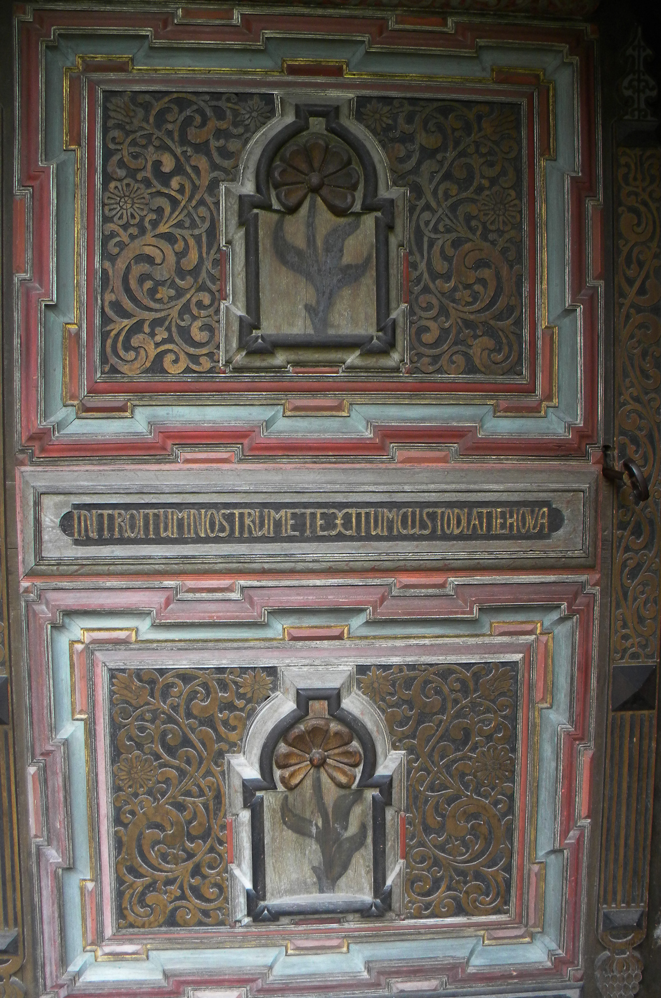 Ragunda gamla kyrka - Kyrkport med gudsnamnet Jehova i den latinska texten